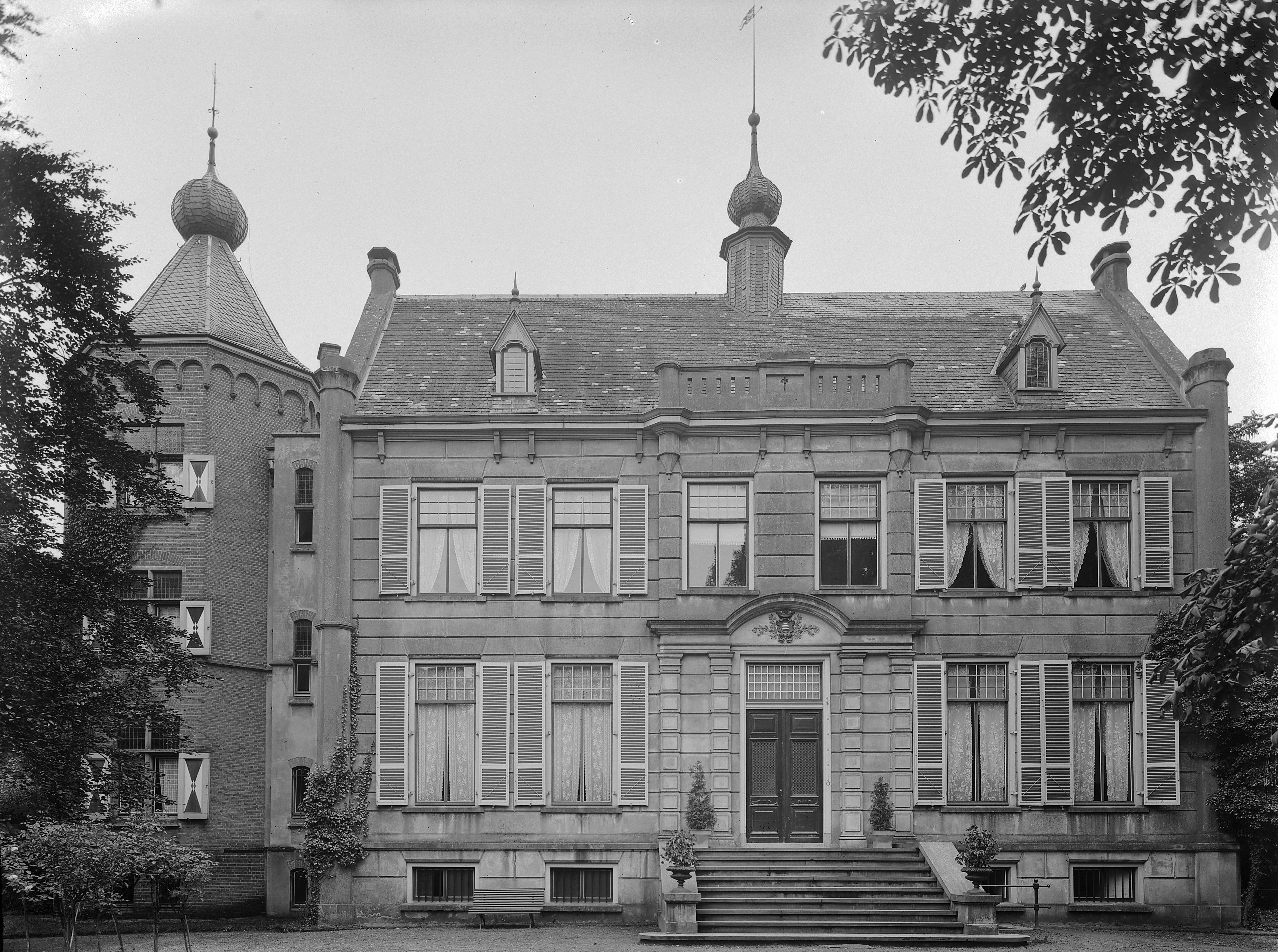 Kasteel Enghuizen: Overzicht voorgevel met toren